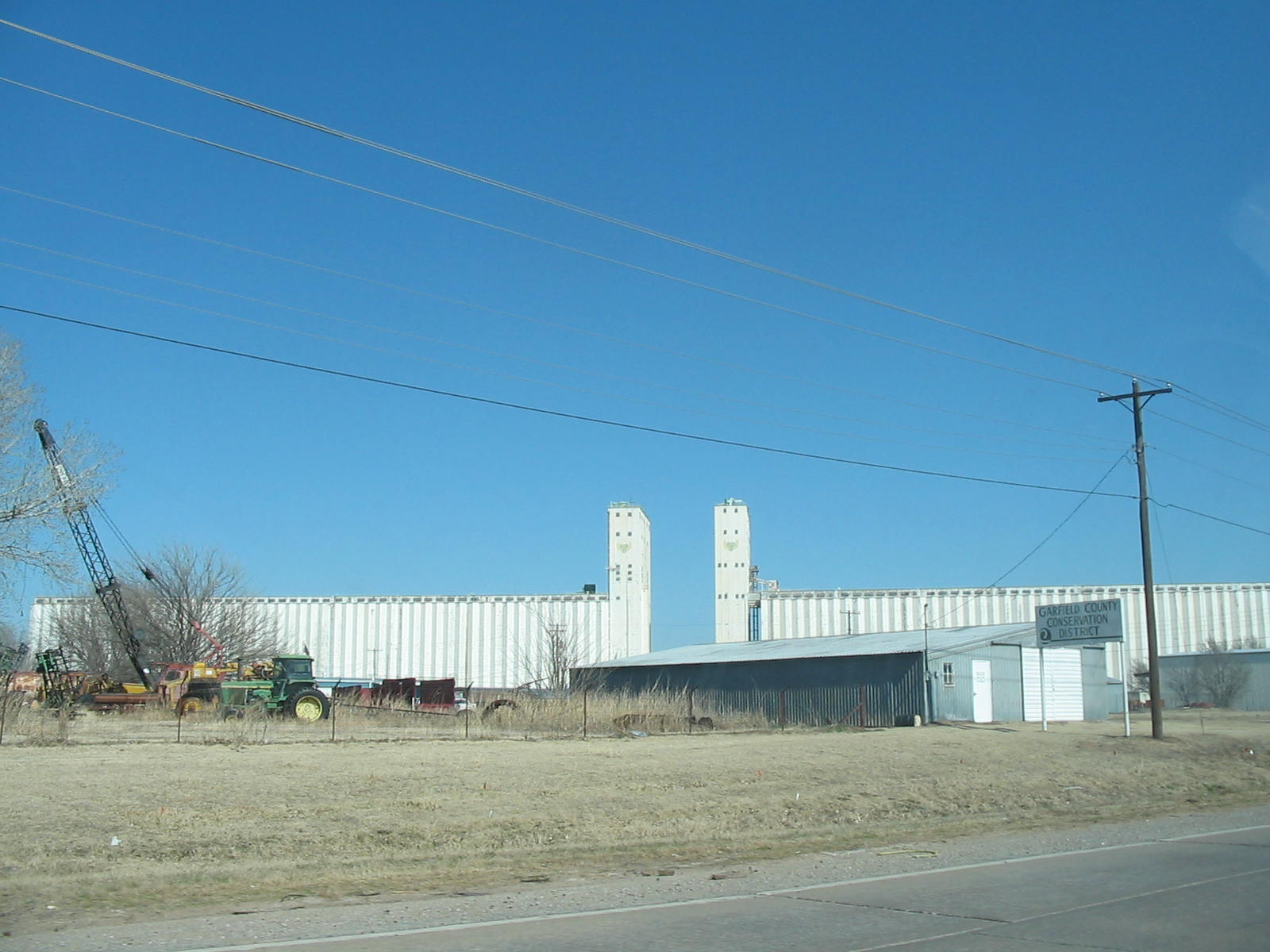 Enid grain elevator.